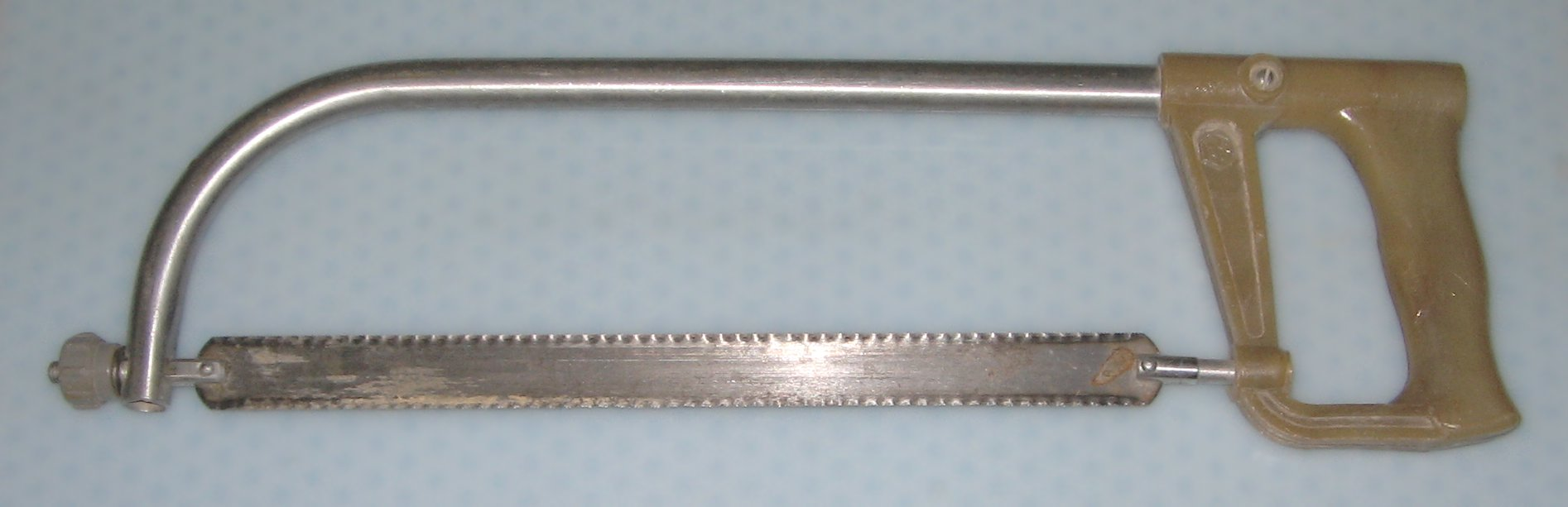 Segilo por metalo La foto estis farita de mi mem.